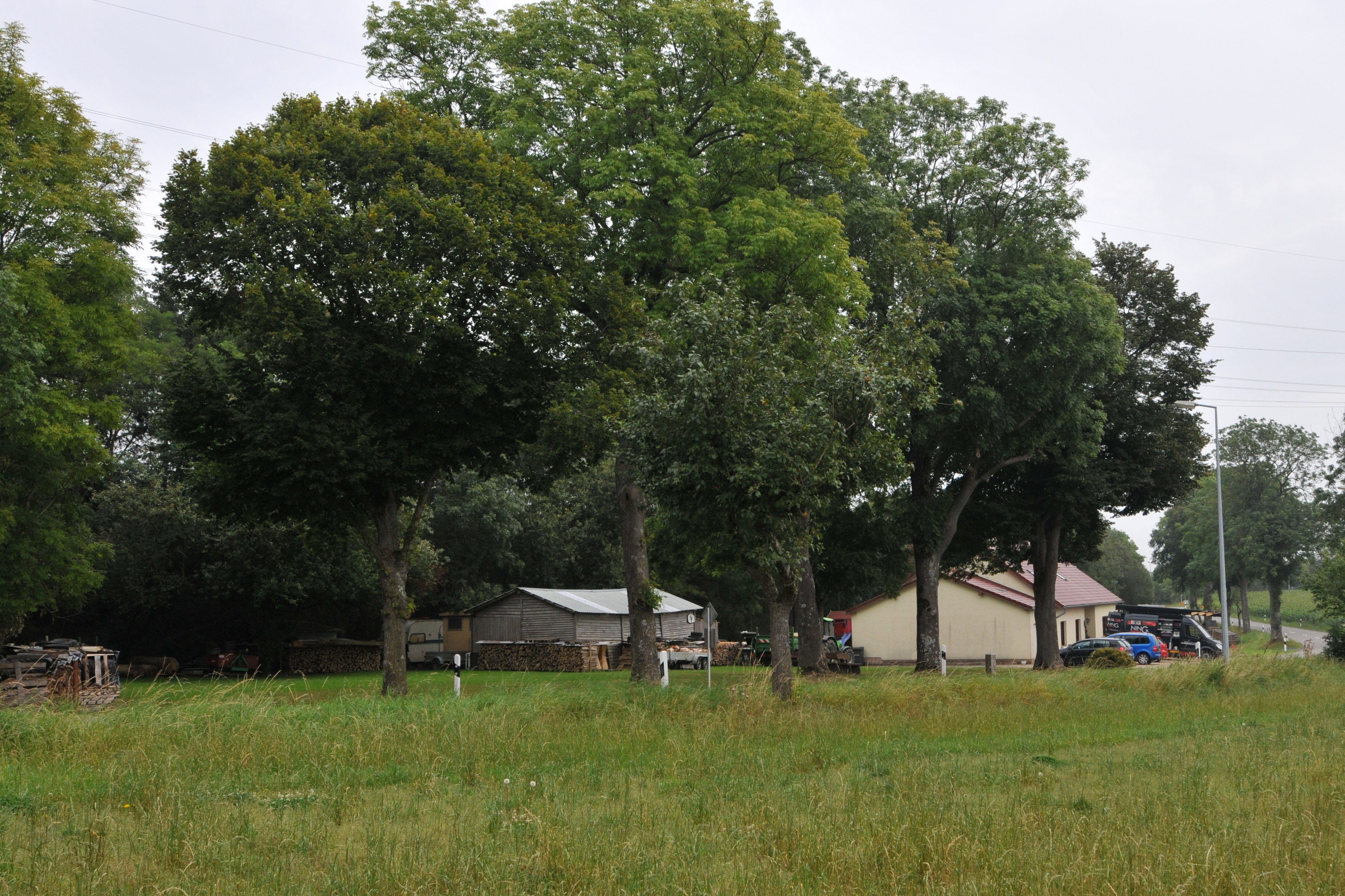 Fléiber.